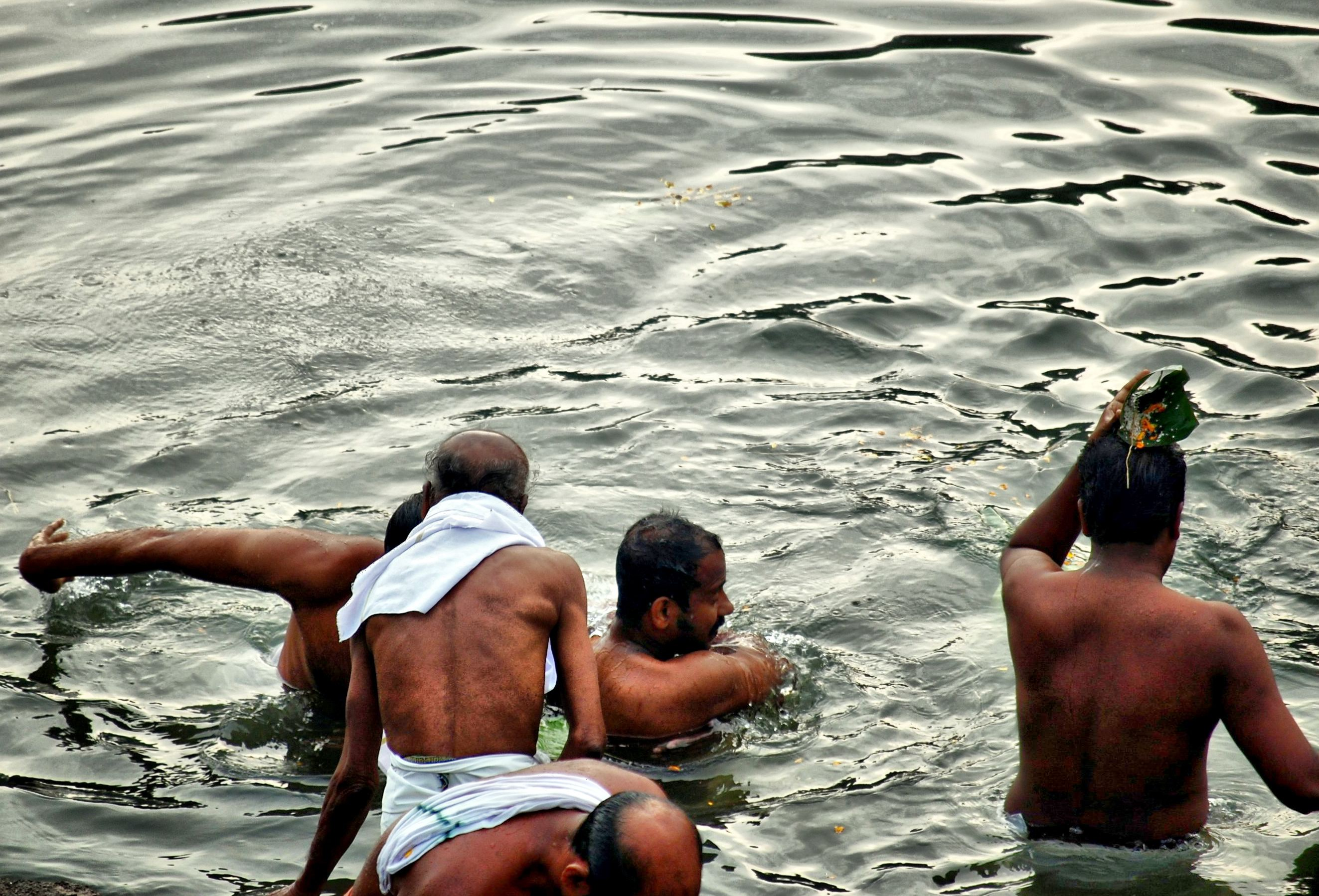 തർപ്പണം ചെയ്ത ശേഷം പുഴയിൽ ഒഴുക്കുന്നു.